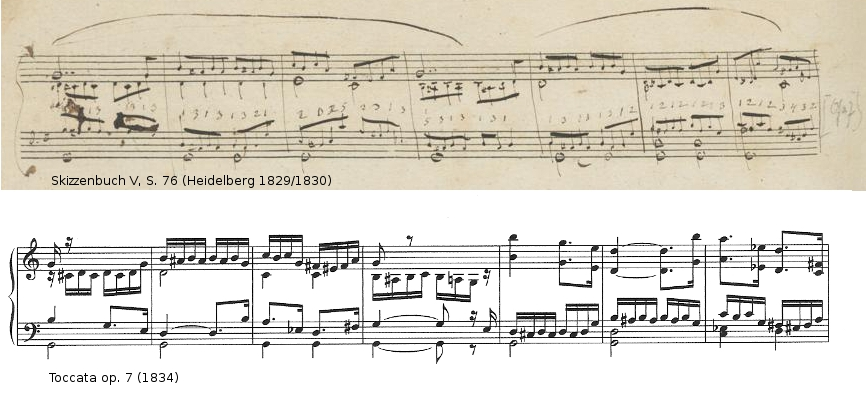 Vergleich eines Abschnitts aus Robert Schumanns Toccata op. 7 und einer diesbezüglichen Skizze.